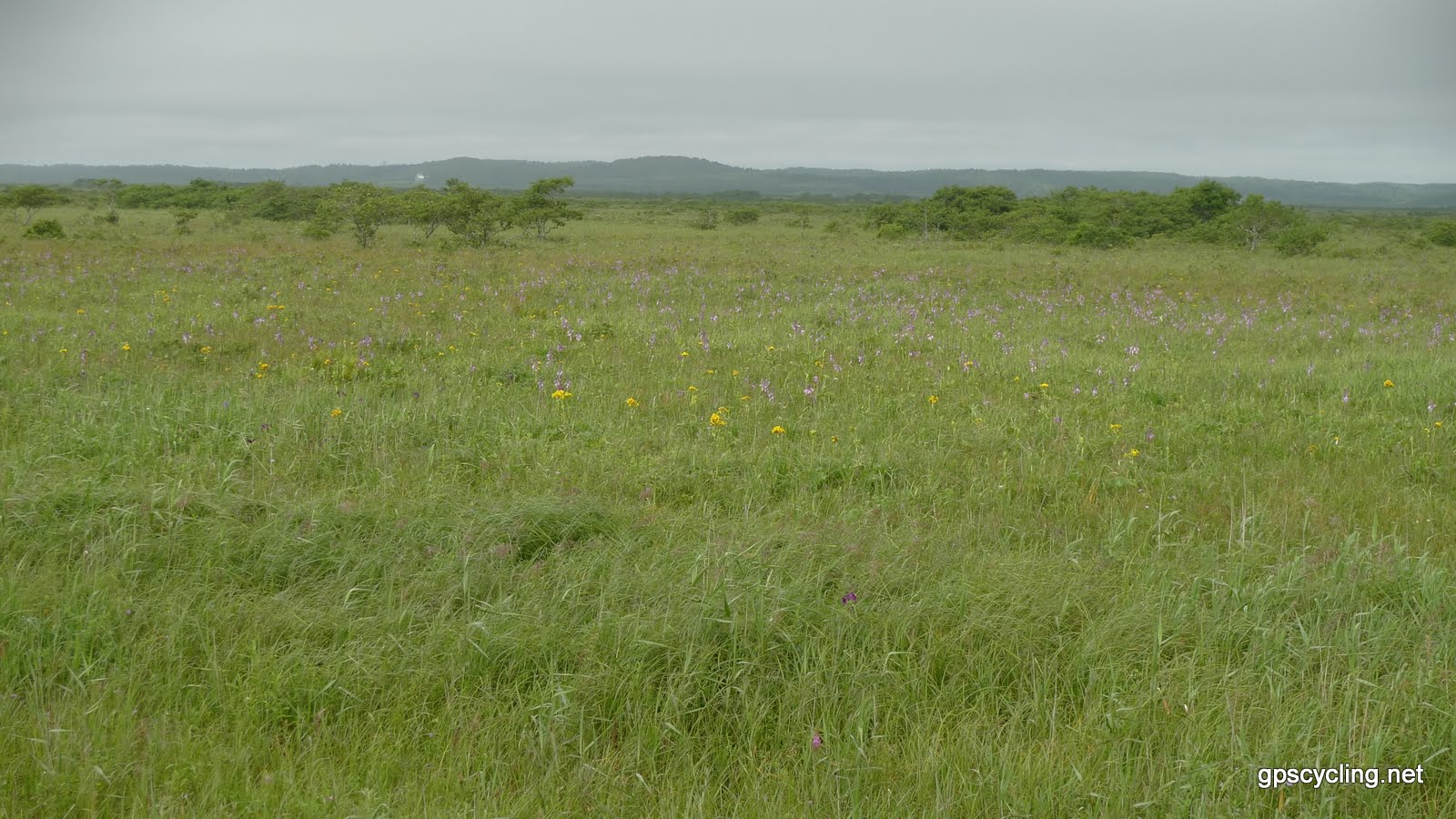 霧多布湿原